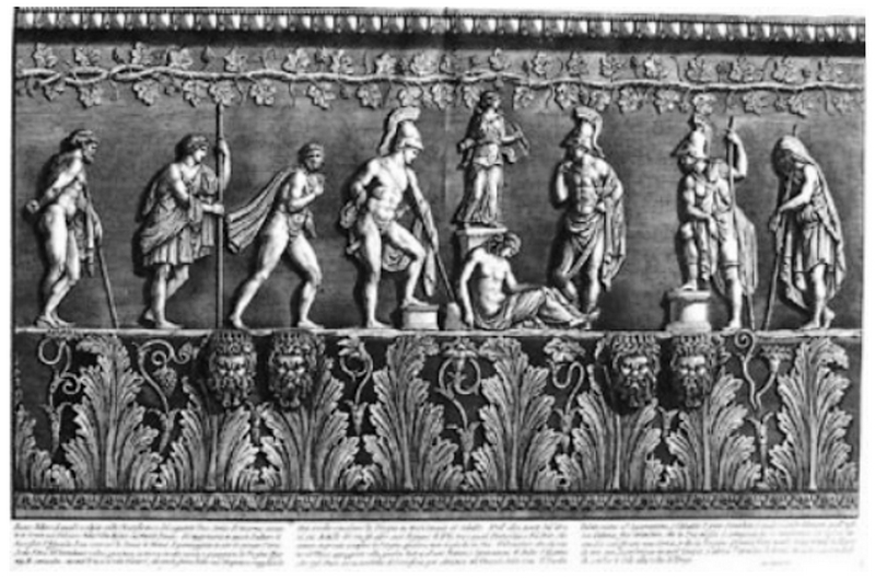 Frontispice du deuxième volume des Vasi, candelabri, cippi, sarcofagi, tripodi, lucerne e ornamenti antichi… (1778) de Giovanni Battista Piranesi (1720-1778). Développement du bas-relief mythologique sur le Vase Médicis.